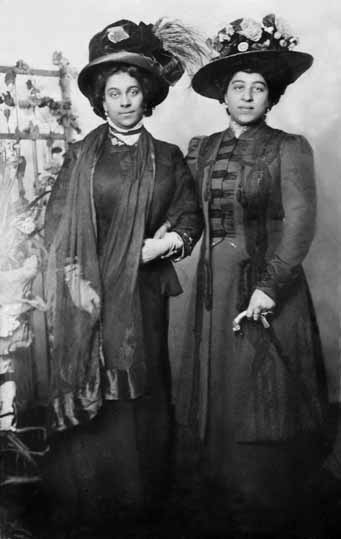 Русские цыганки из состоятельных семей